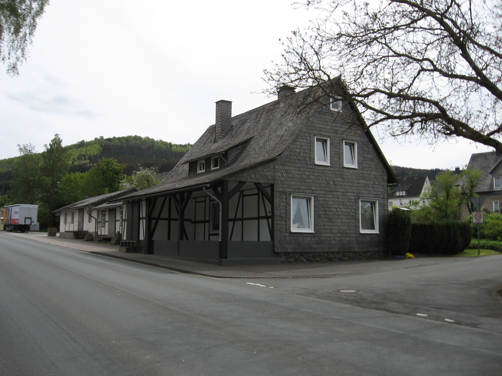 Ehemaliger Bahnhof Olsberg-Wiemeringhausen an der Kleinbahn Steinhelle-Medebach von Nordosten.